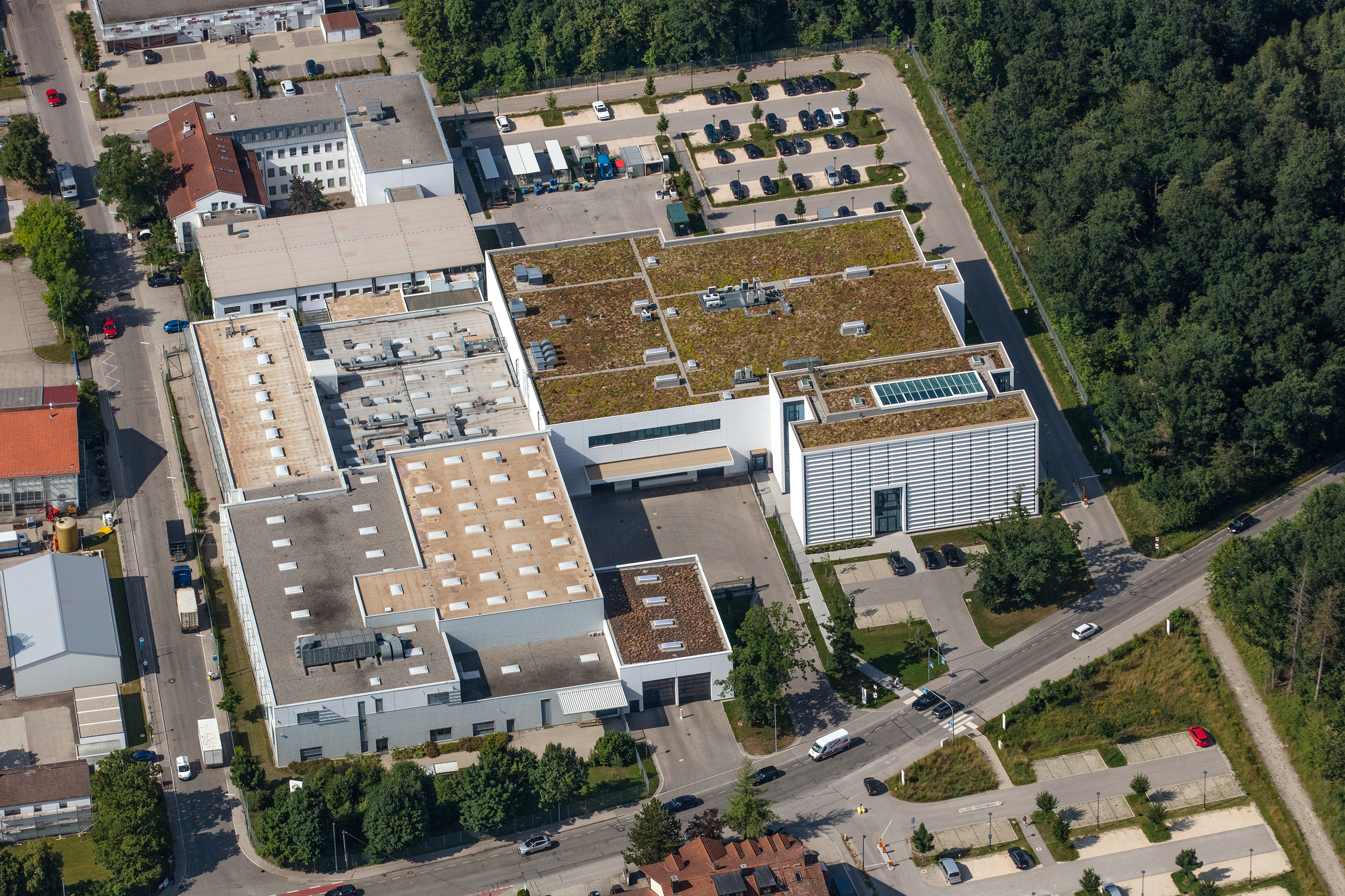 Luftaufnahme von Schleifring und Apparatebau GmbH